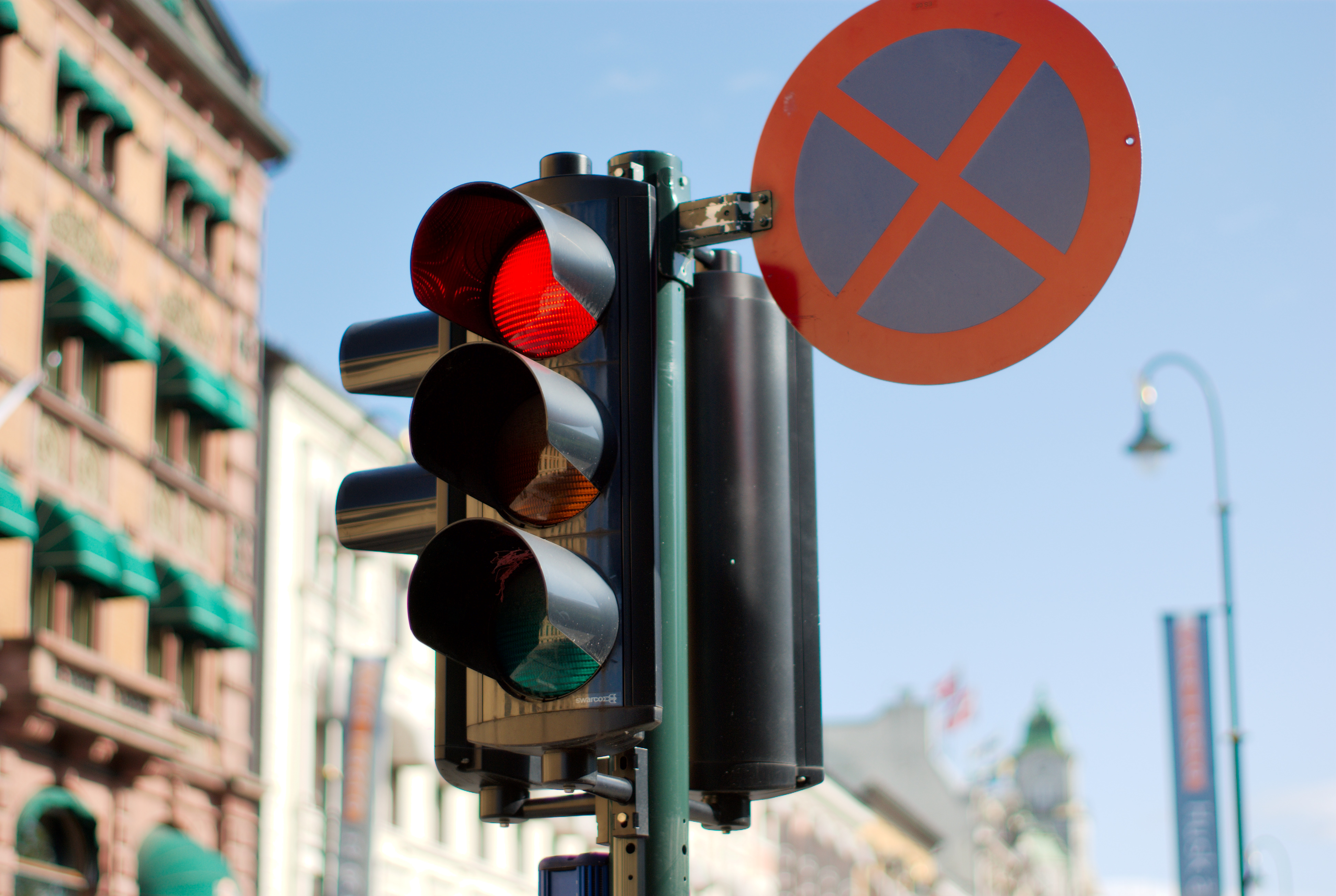 Red streetlight on Karljohan in Oslo.